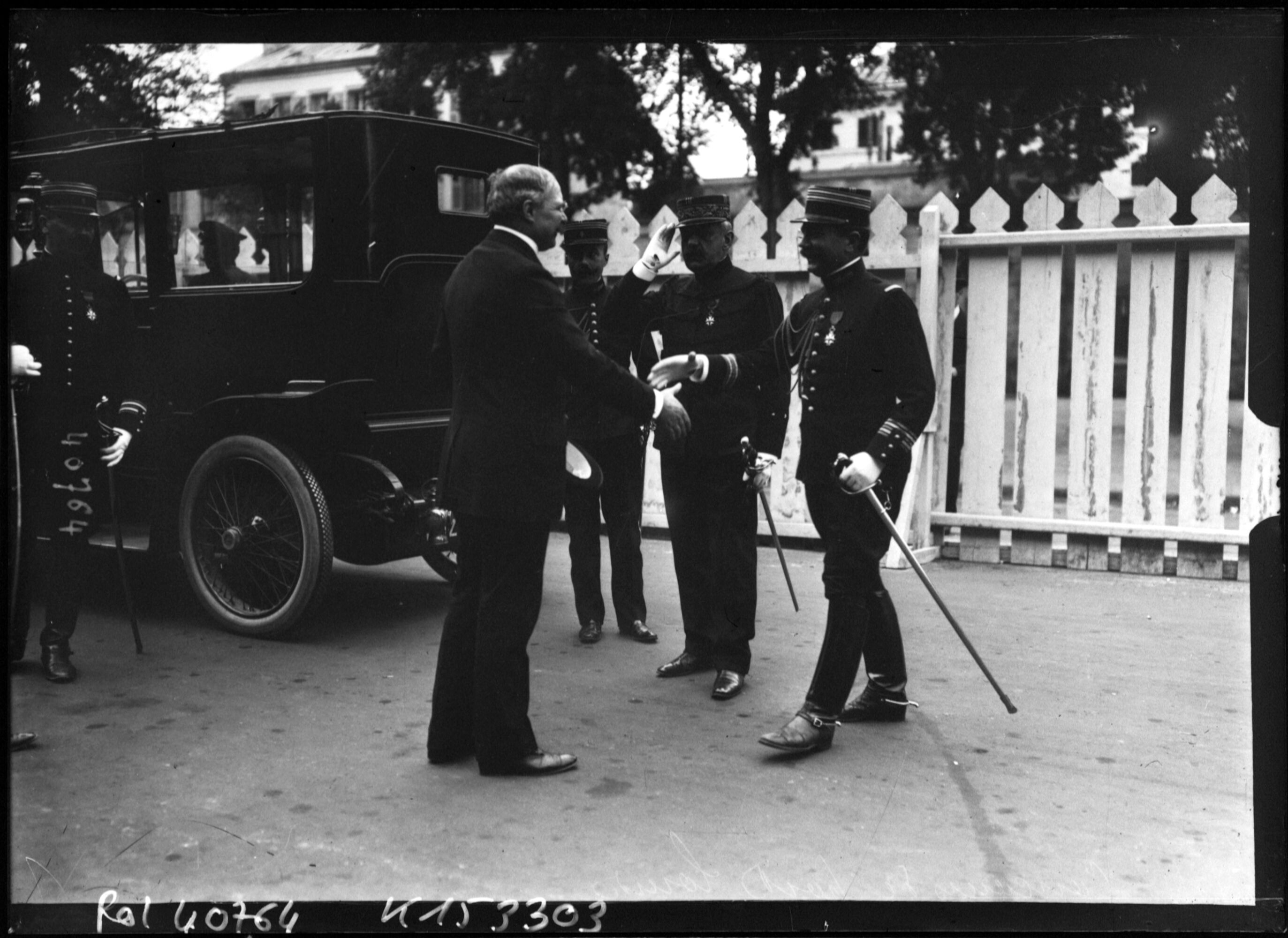 vue de cf titre.